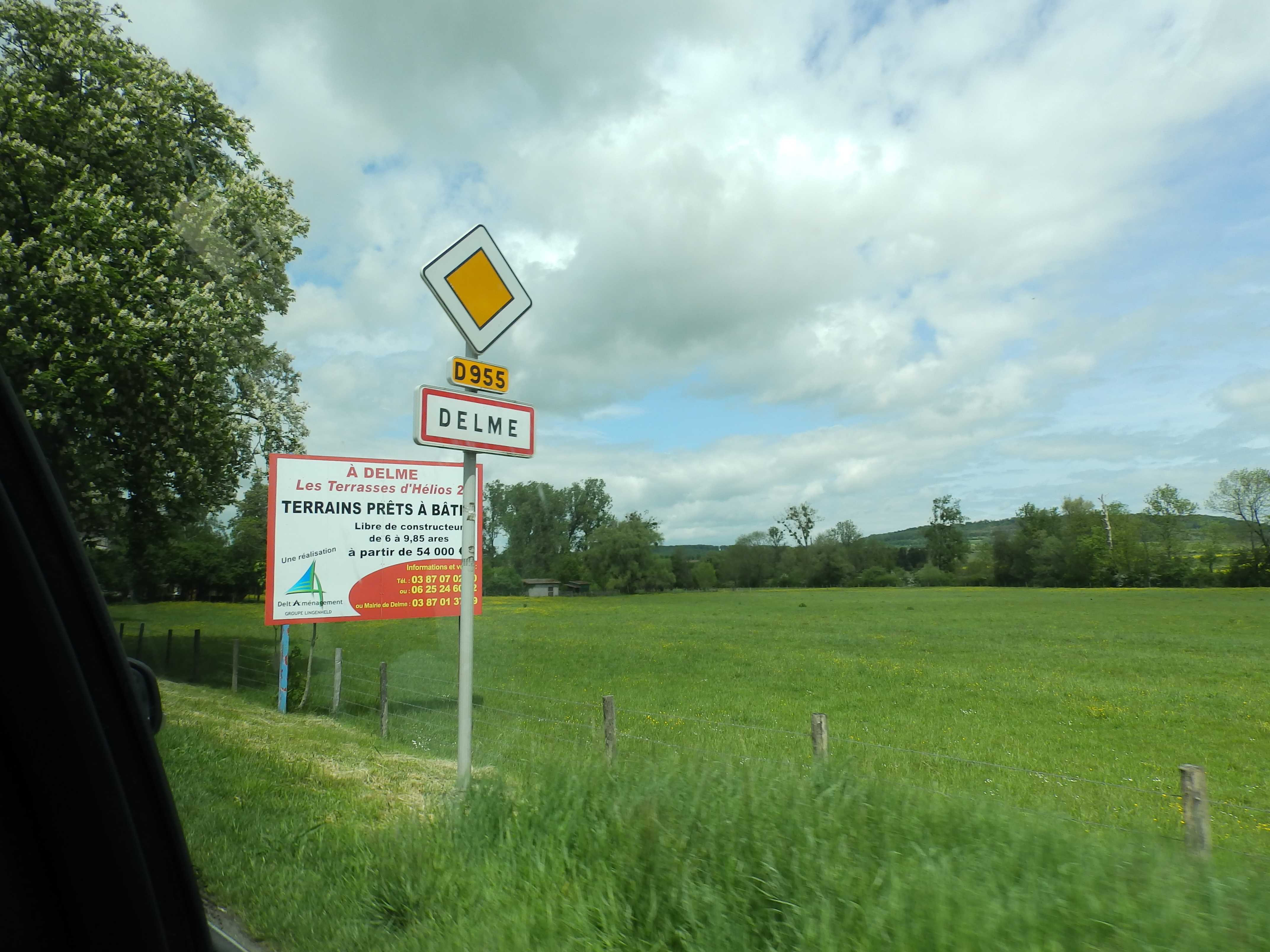 In Frankrijk